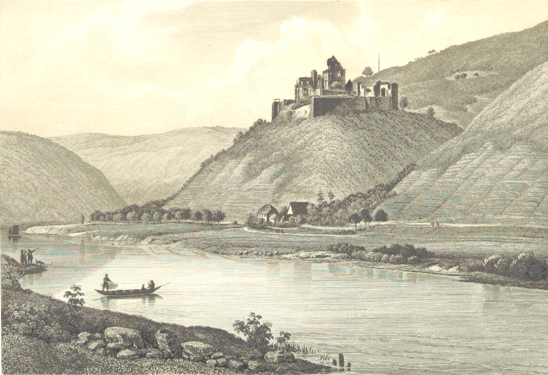 Collenberg. Stahlstich nach Vorzeichnung von Fritz Bamberger, 1847, aus: Ludwig Braunfels; Die Mainufer und ihre nächsten Umgebungen. Verlag Carl Etlinger, Würzburg 1847. Gedruckt in der Kunstanstalt von Carl Mayer, Nürnberg.